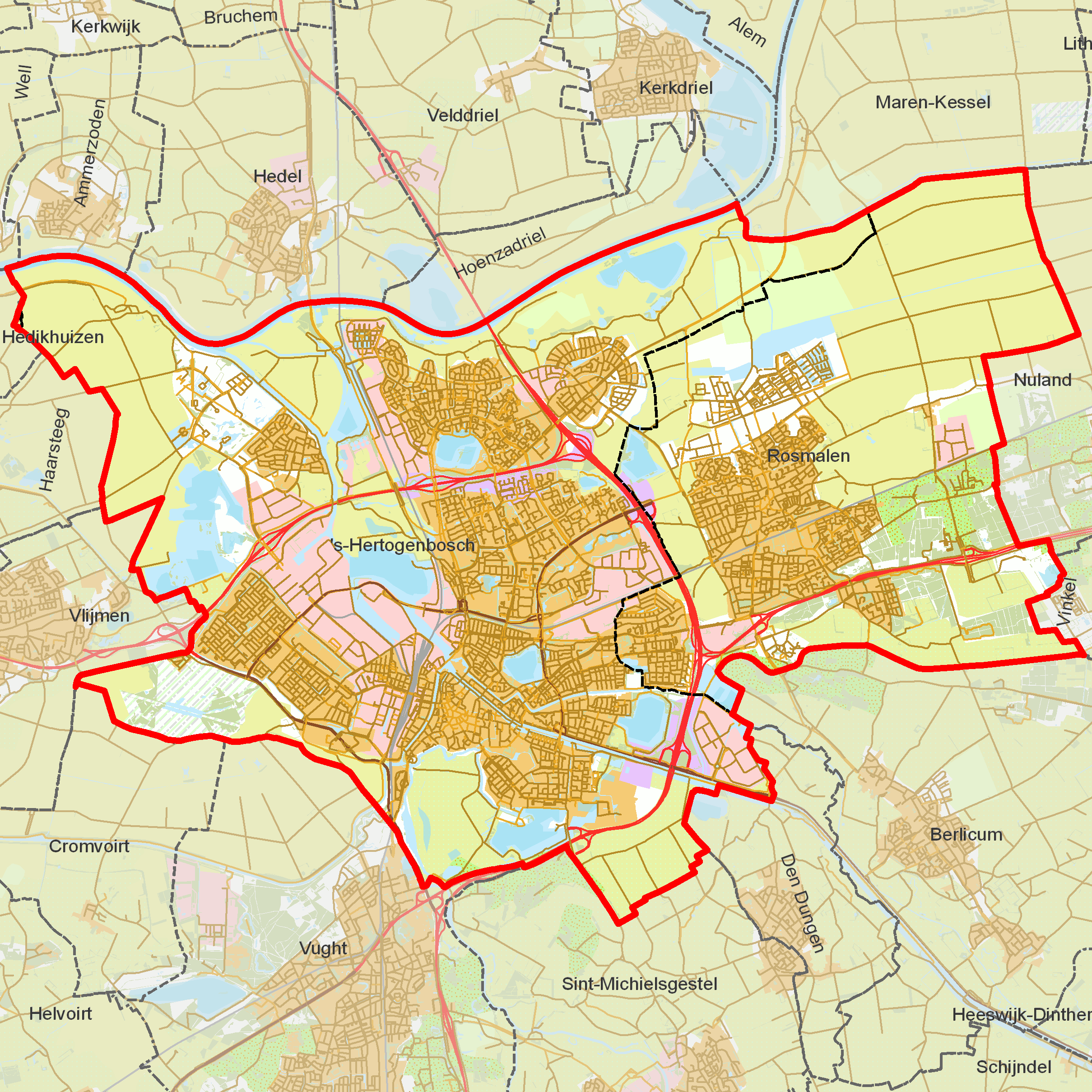 BAG woonplaatsen - Gemeente 's-Hertogenbosch.png